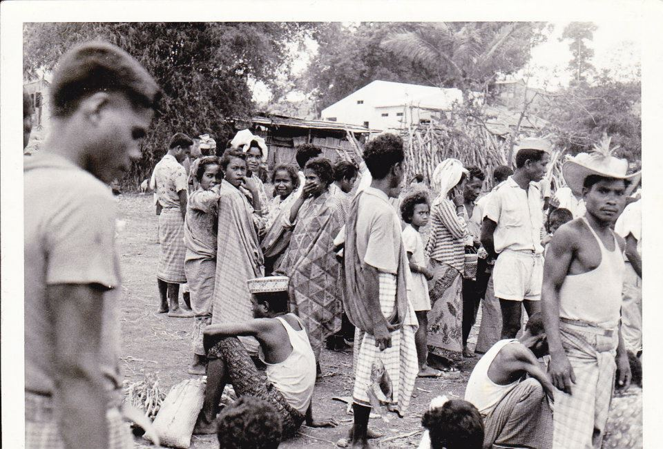 No bazar